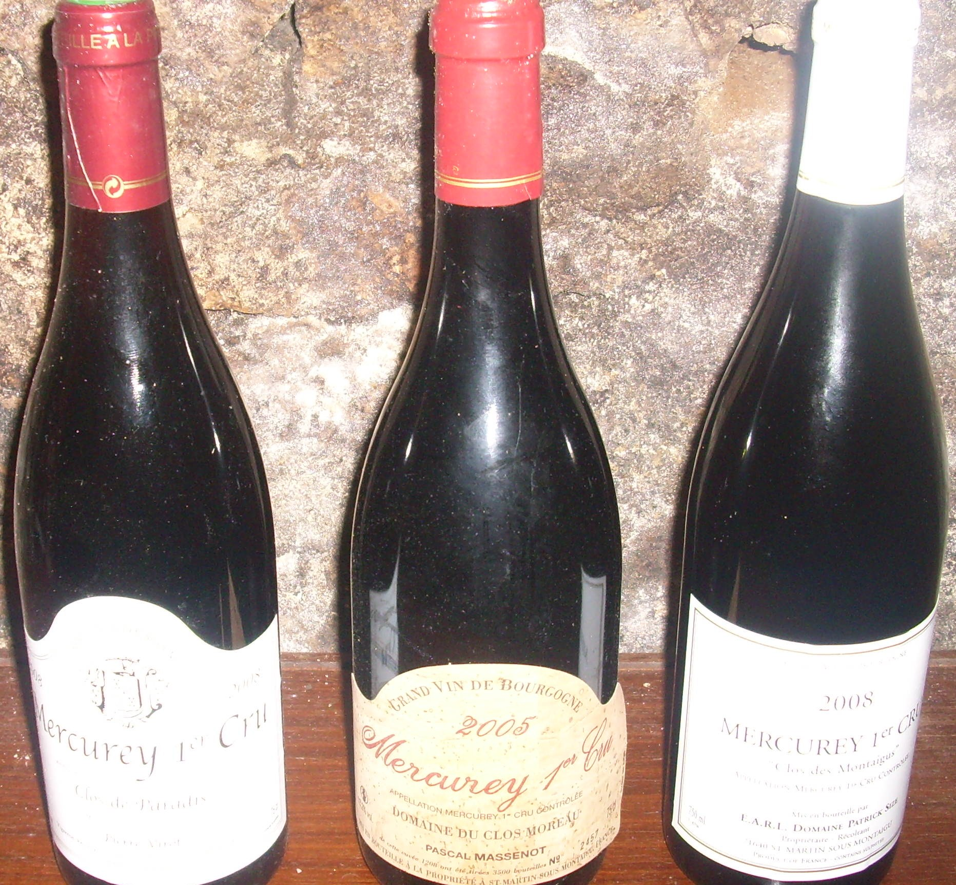 Bouteilles de vins de Mercurey 1er cru de producteurs de Saint-Martin-sous-Montaigu (71)